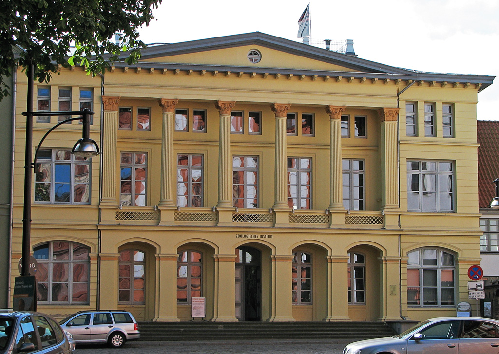 Zoologisches Institut der Universität Rostock, Universitätsplatz 2 in Rostock, Mecklenburg-Vorpommern;erbaut 1842-1845, 1845-1880 Sitz des Mecklenburgischen Oberappellationsgerichts; unter Denkmalschutz